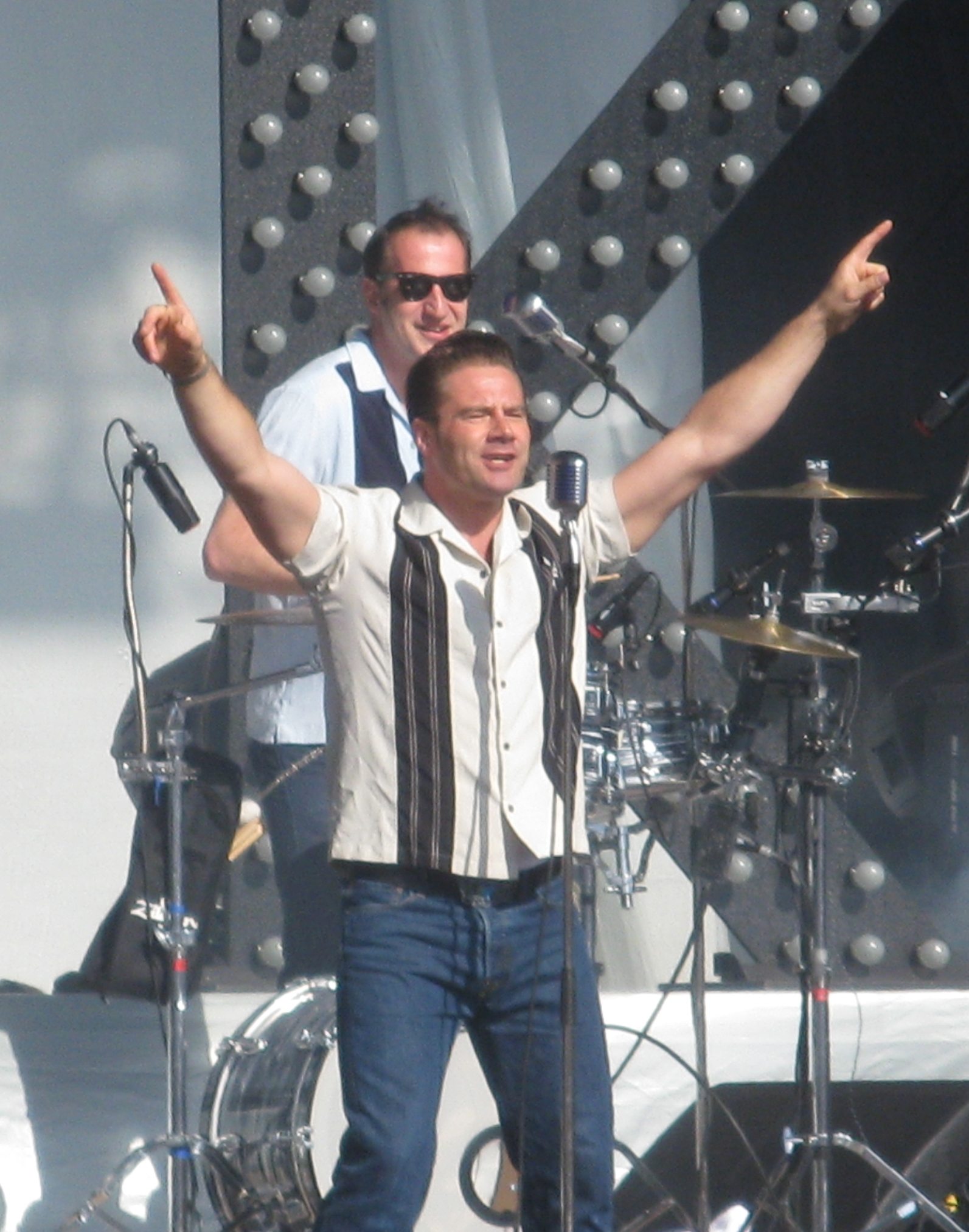 Dick Brave beim Deichbrand-Festival 2012